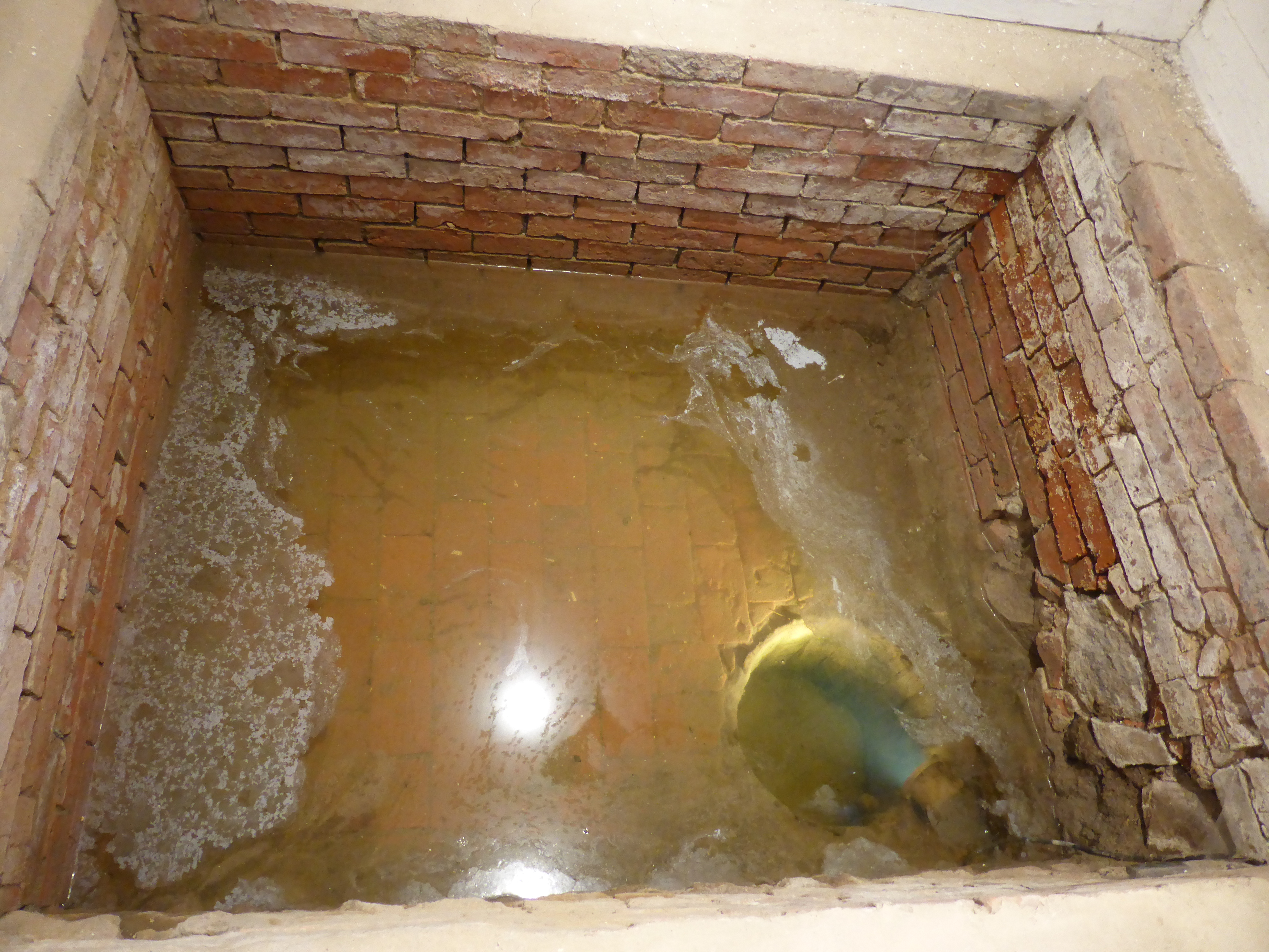 Die grundwasser-gespeiste Mikwe, im rechten Bildteil das original erhaltene Eichenfass